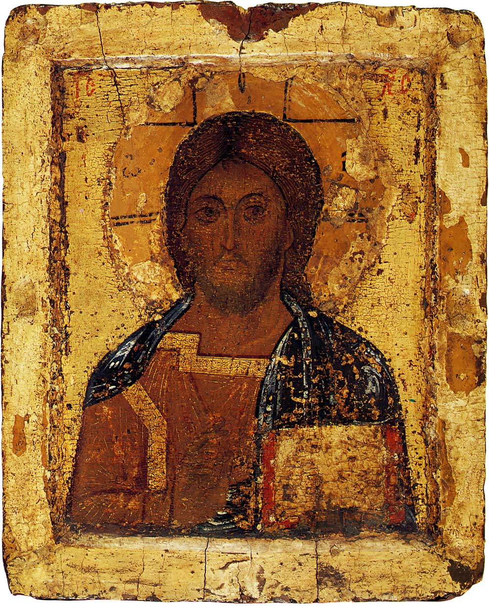 Спас Вседержитель, 44.5 × 37 см, начало XIII века, Ярославский художественный музей. Происходит из Успенского кафедрального собора в Ярославле (освященного в 1219 году), где до начала XX века икона находилась около раки с мощами святых ярославских князей Василия и Константина. По преданию икона была их моленным образом.